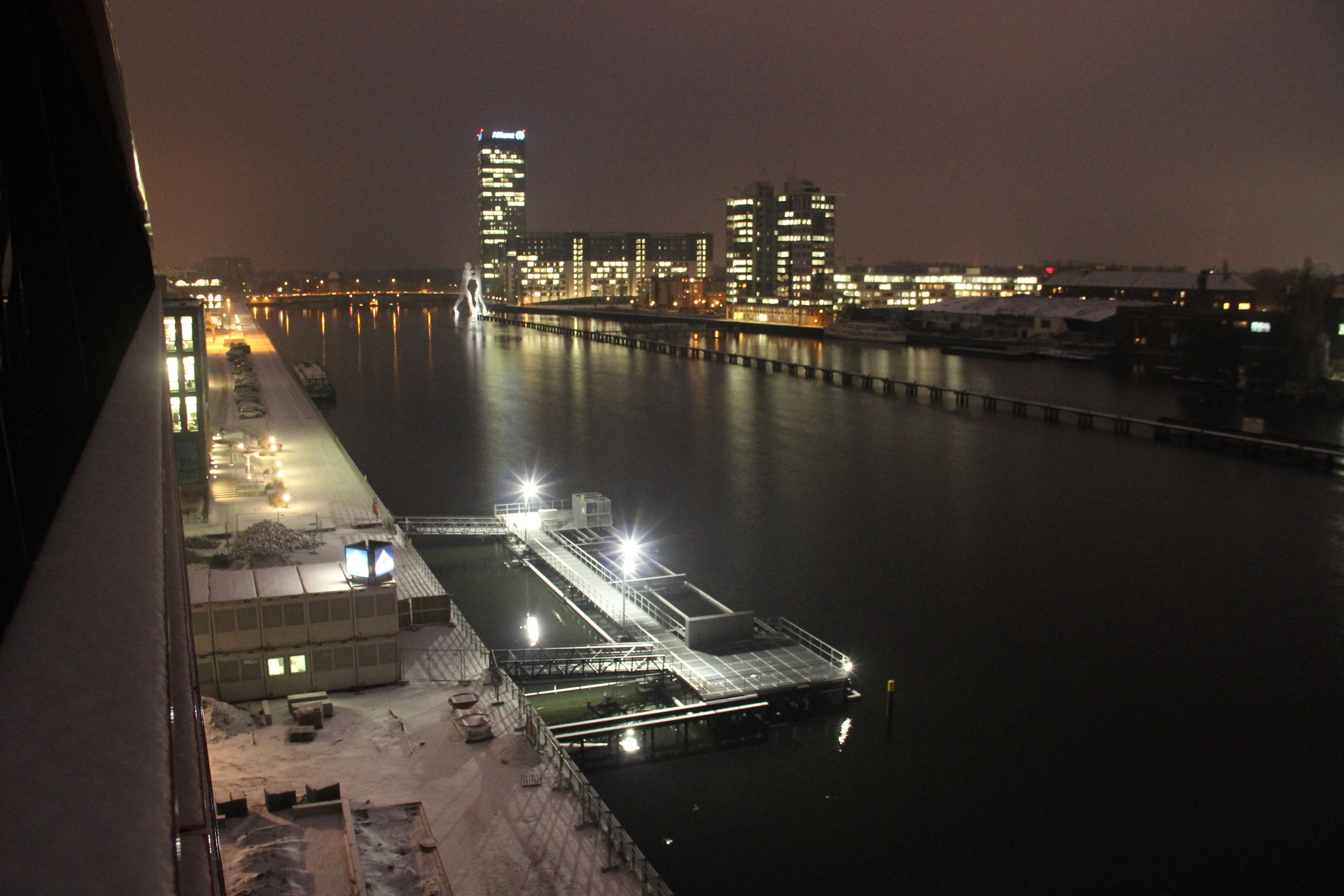 Die Anlage SPREE2011 während des Baus bei Nacht. Blick vom CocaCola Gebäude